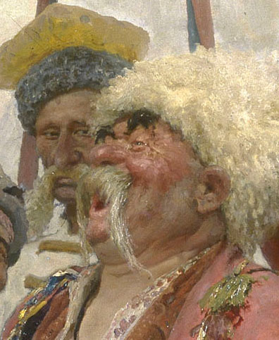 Lachender Kosak mit Schafsfellmütze. Ausschnitt aus dem Gemälde Die Saporoger Kosaken schreiben dem türkischen Sultan einen Brief